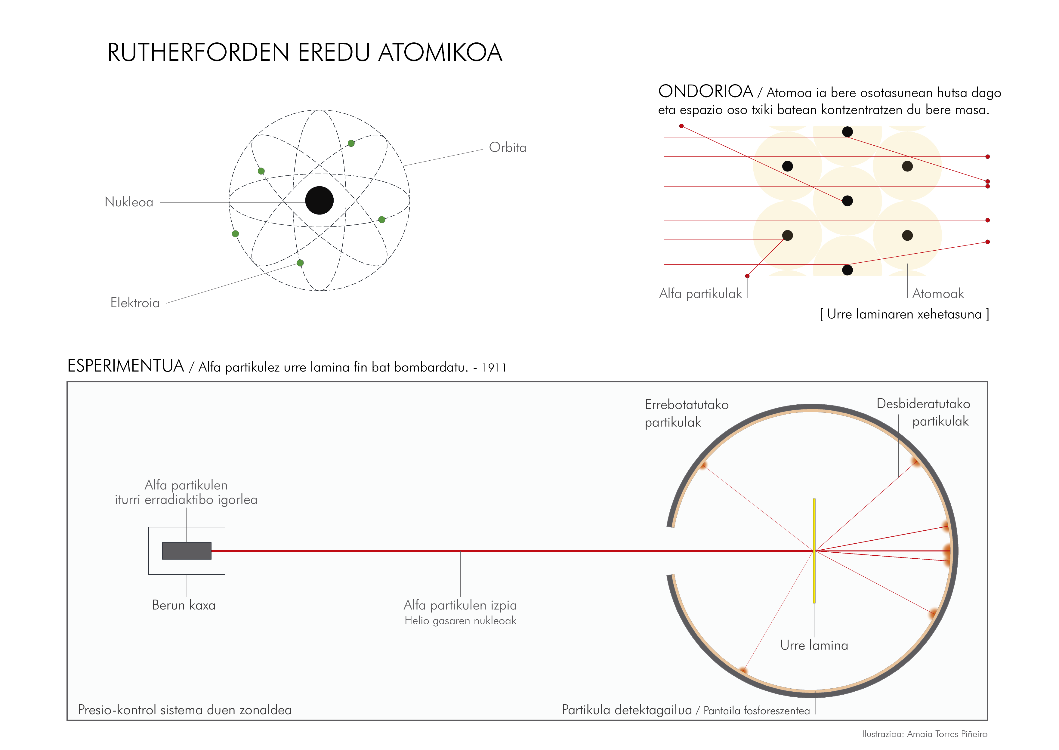 Experimento por el que se dedujo el modelo atómico de Rutherford